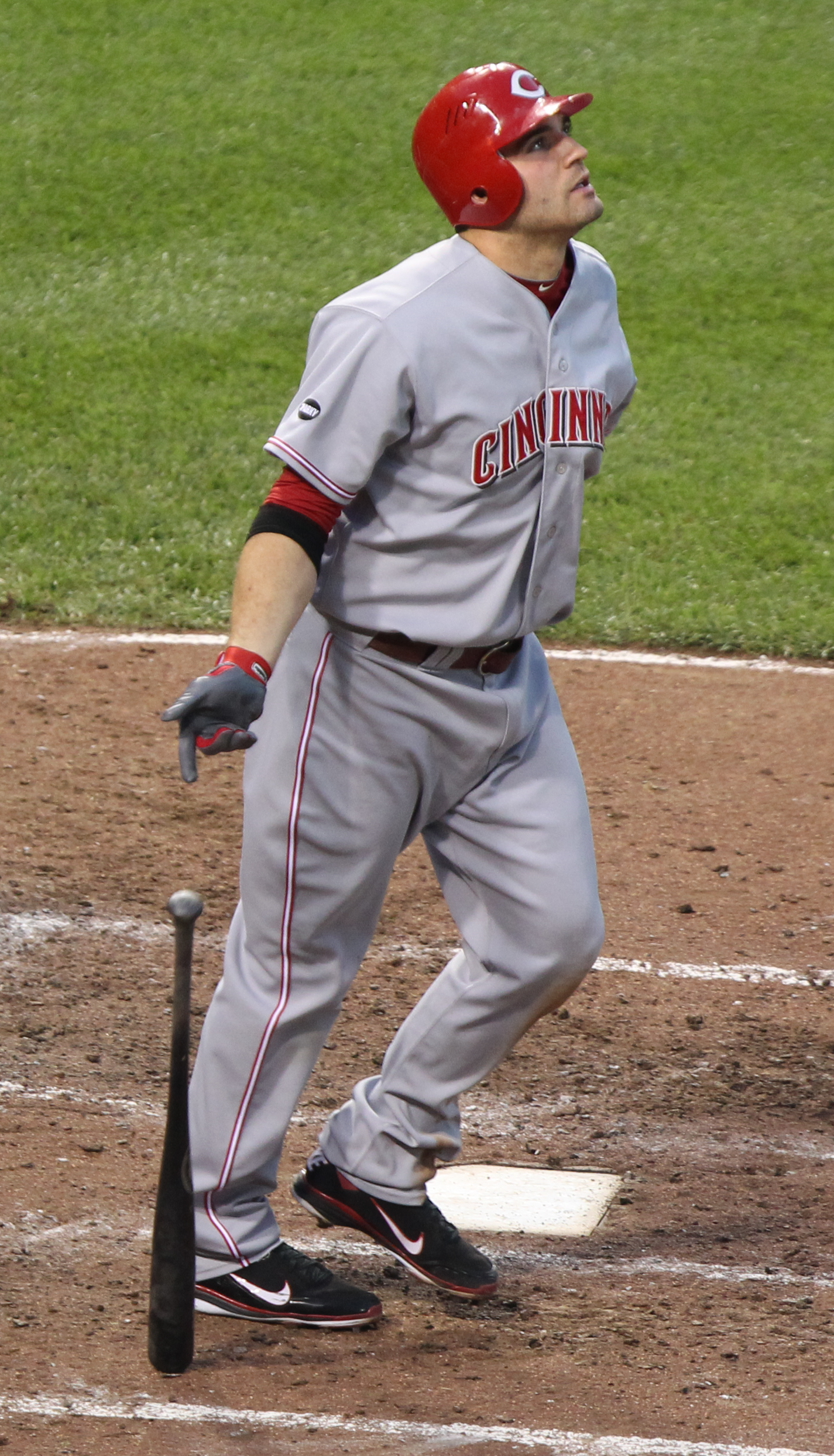 Joey Votto